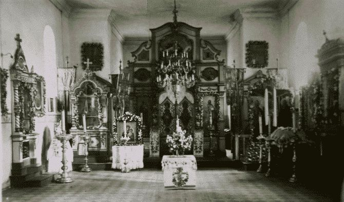 Беларуская (тарашкевіца): Новы Сьвержань (Novy Śvieržań), рог пляцу Рынку (plac Rynak) і вуліцы Менскай (vulica Mienskaja). Царква Прачыстай Багародзіцы